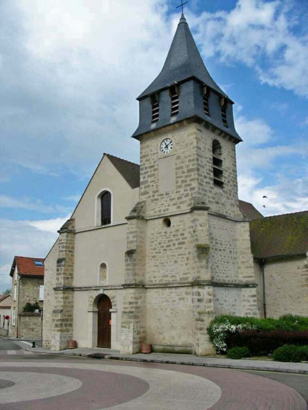 Église de de la Nativité-de-la-Vierge, La Falaise (Yvelines) Photo JH Mora, mai 2005